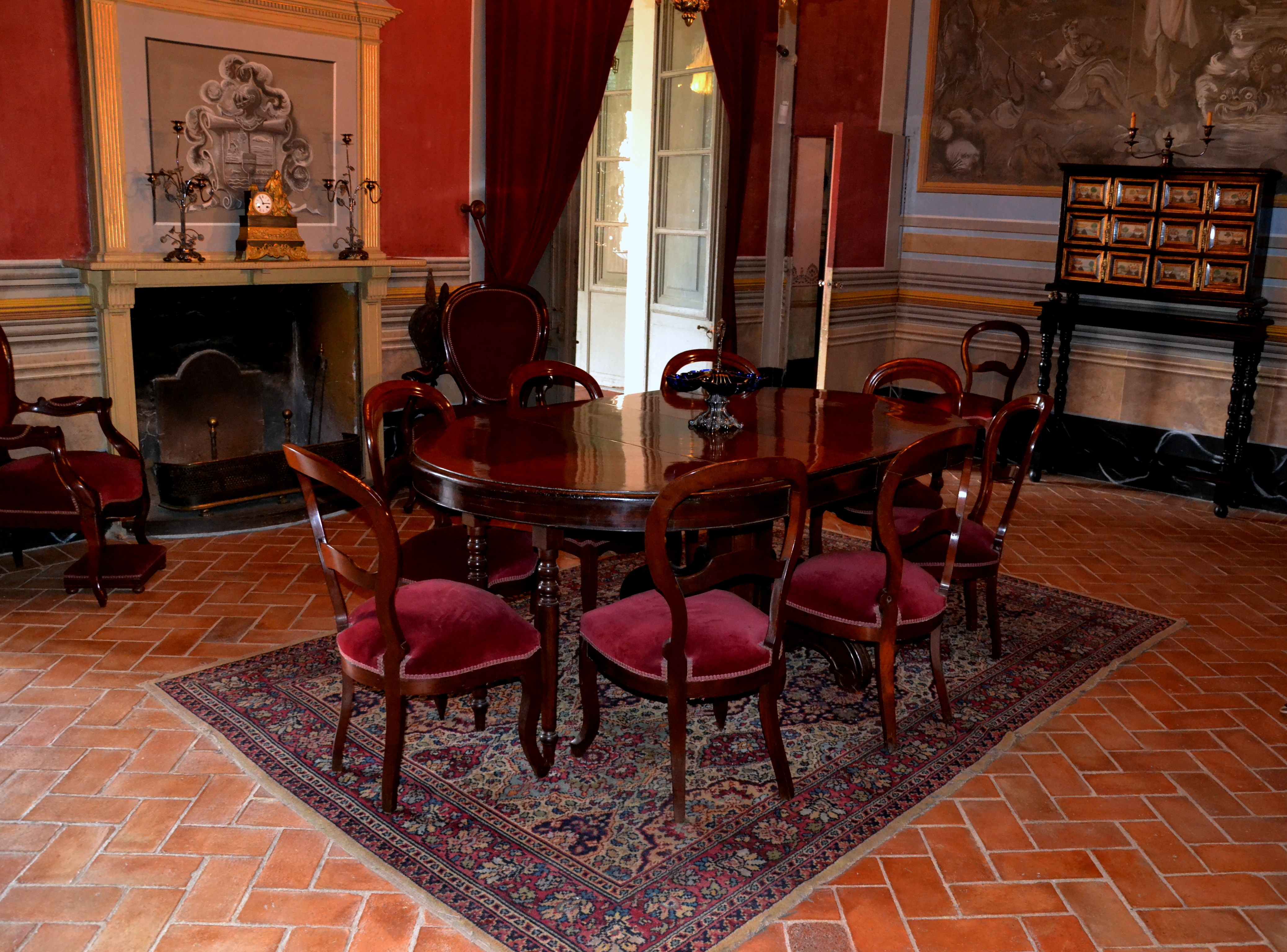 Interior del menjador del Museu Romàntic Can Papiol, Vilanova i la Geltrú (Catalonia).